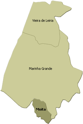 localisation de moita sur la freguesia de marinha grande